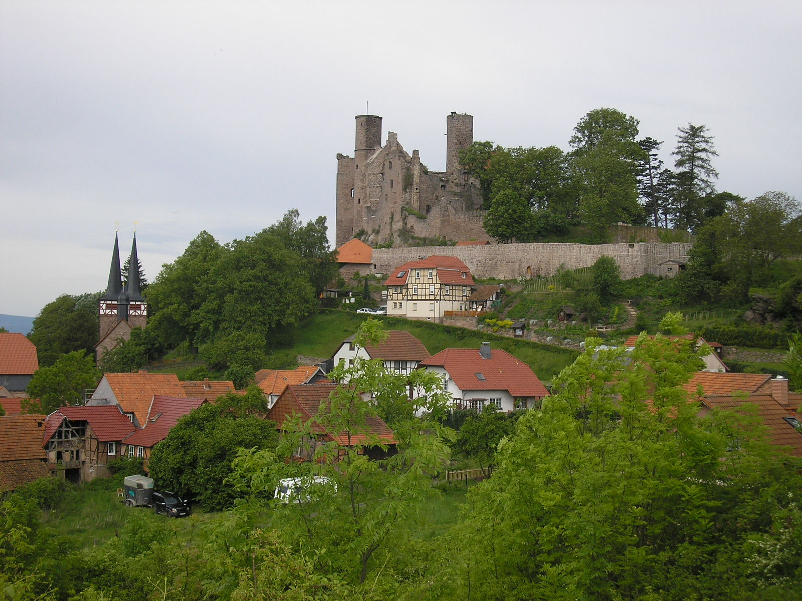 Blick auf die Burg Hanstein im Eichsfeld (Thüringen).